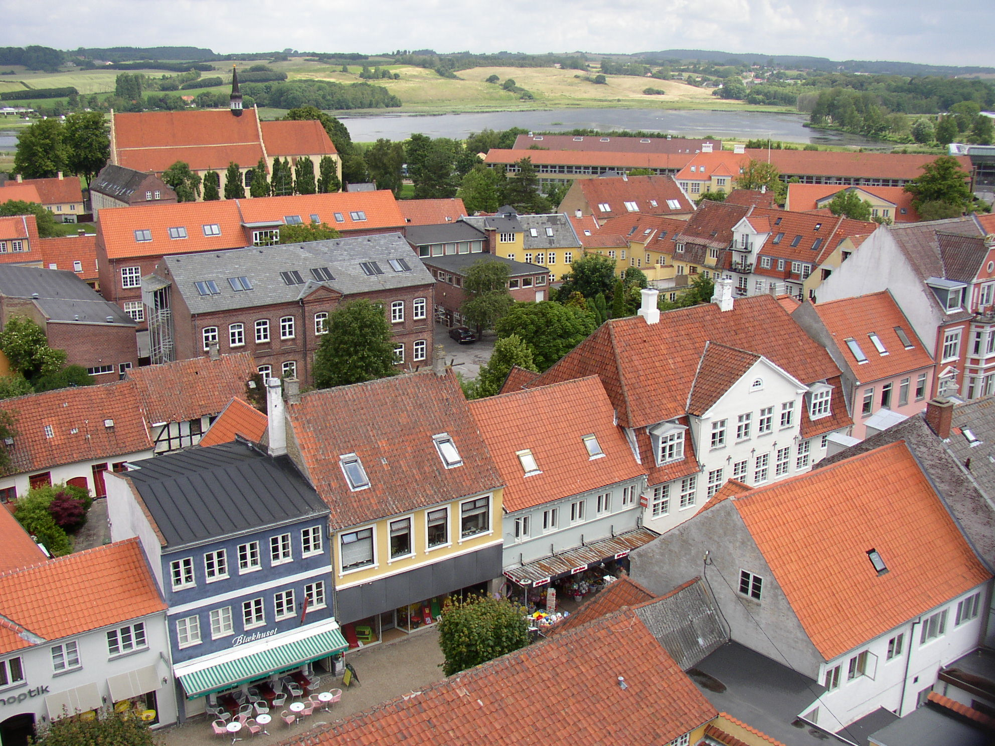 View over Faaborg from the clock tower Udsigt over Faaborg fra Klokketårnet